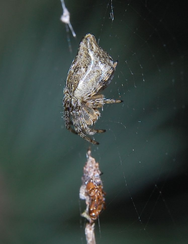 Cyclosa conica, female